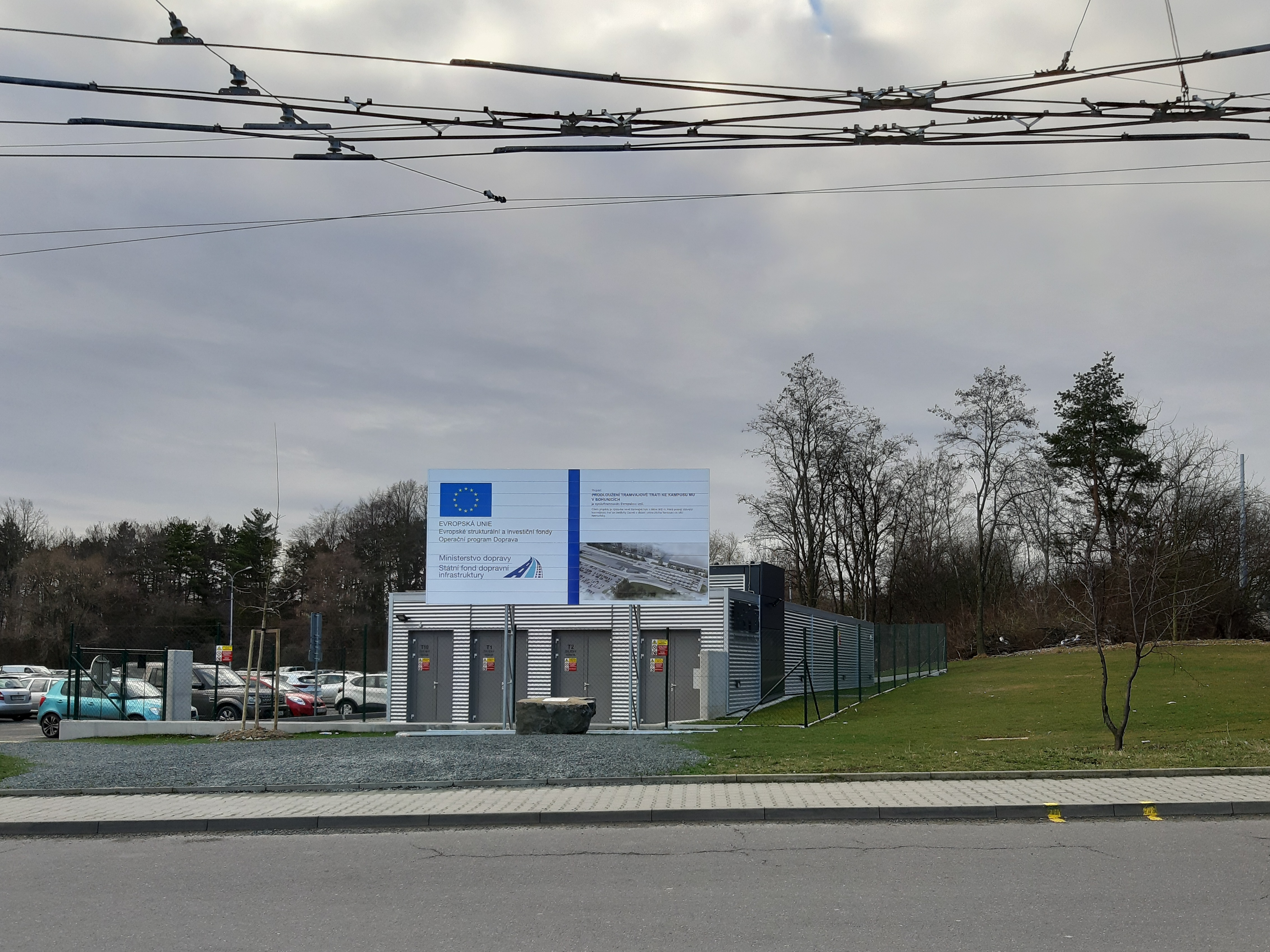 Měnírna Netroufalky v dopravním uzlu Nemocnice Bohunice